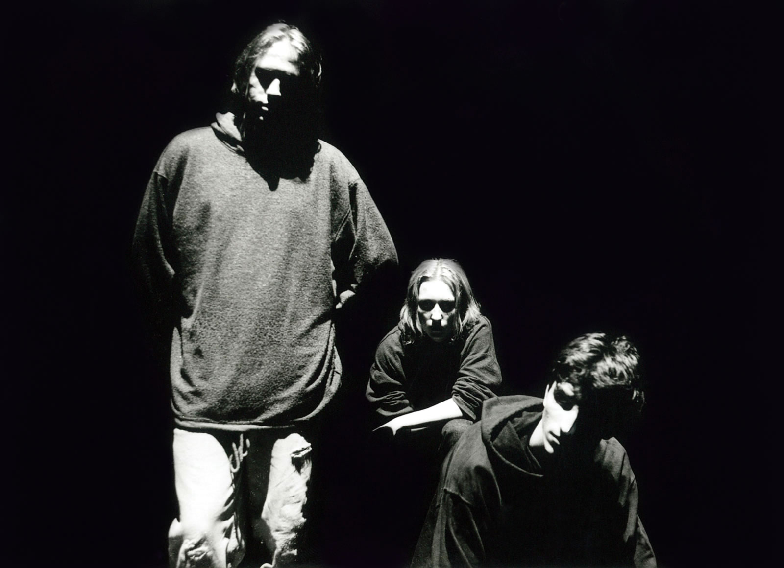 Profilové foto z Trnavského divadla pod taktovkou Pavela Pechu, 1994.